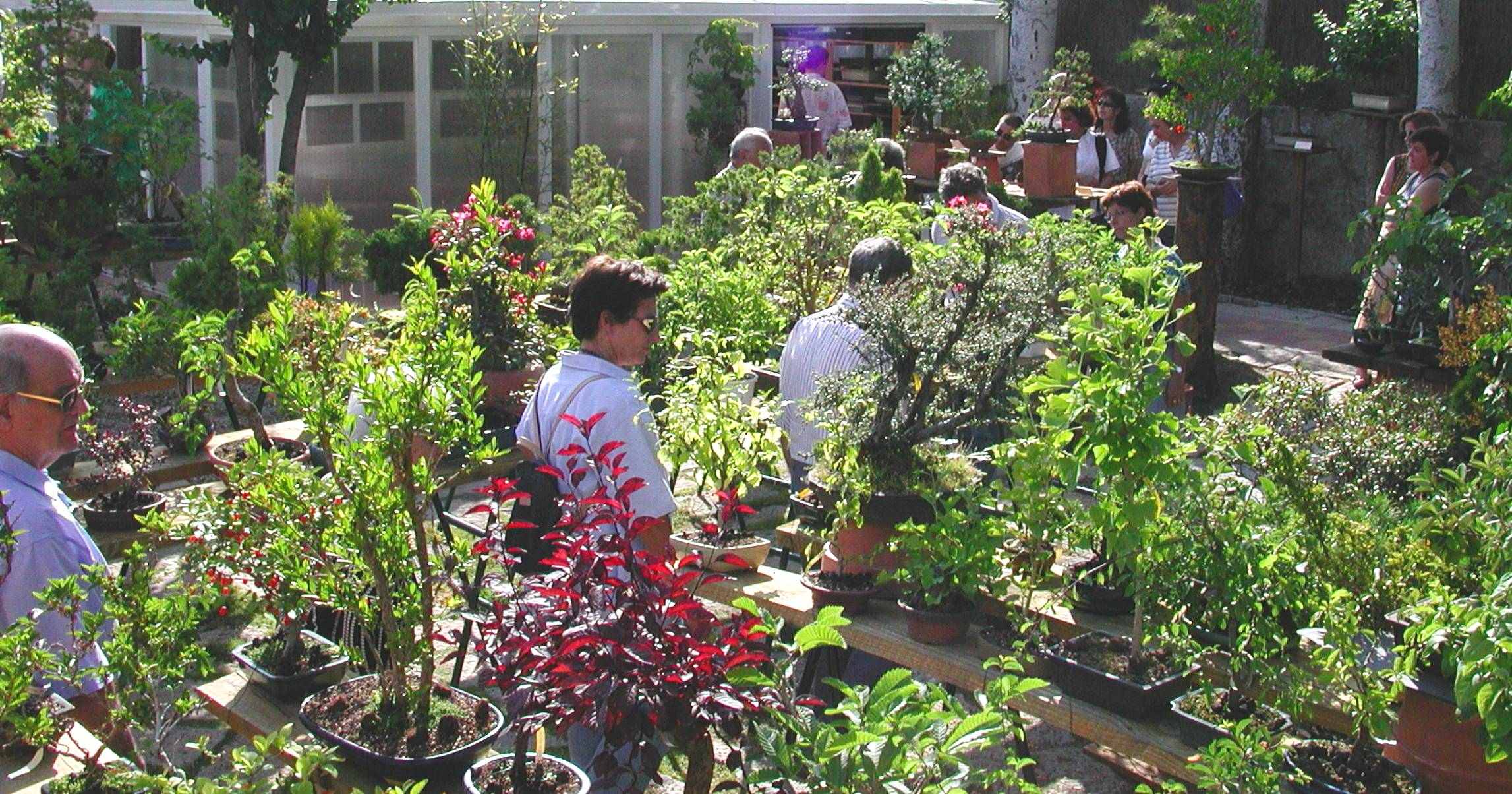 vivero de bonsái en Madrid (España)